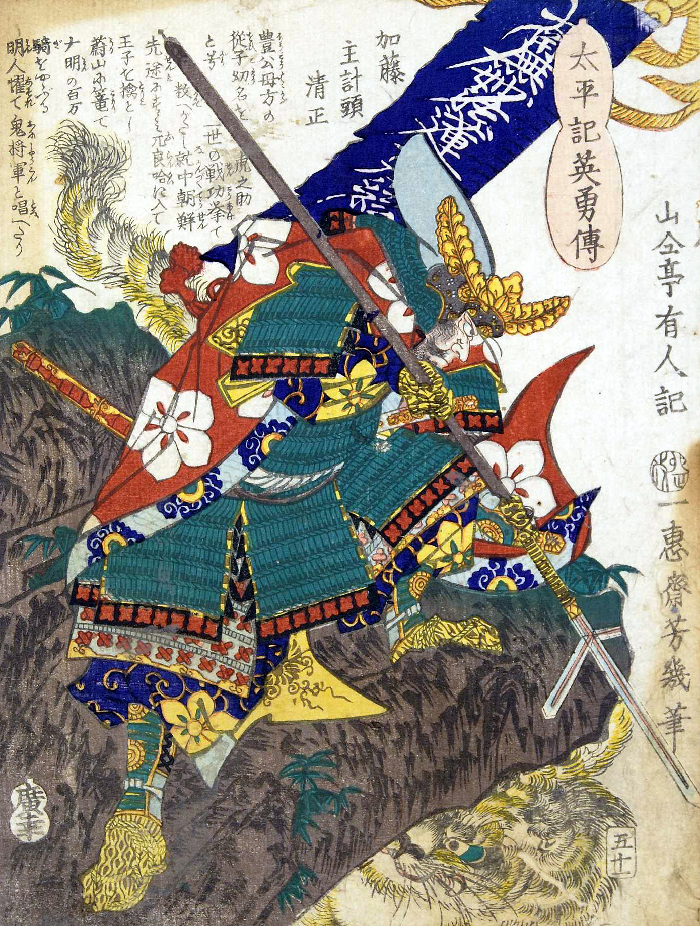 「太平記英勇伝五十一:加藤主計頭清正」1867年